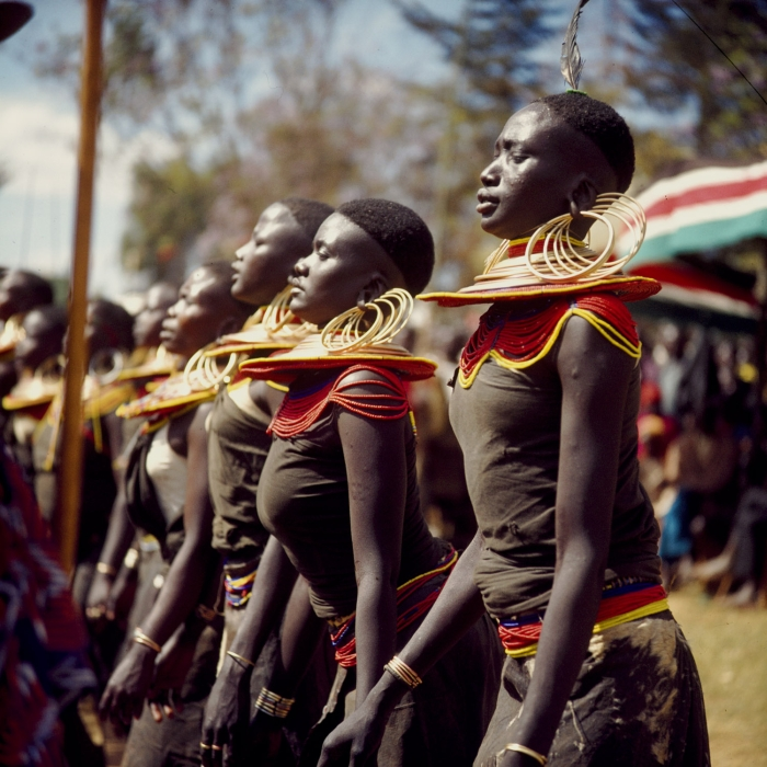 De vrouwen dragen de traditionele rok van ossenhuid. Op 12 december 1963 werd Kenia onafhankelijk verklaard en in 1964 trad zij toe als Republiek tot het Britse Gemenebest. Jomo Kenyatta (20-10-1893 - 22-8-1978) werd de eerste president. De opname is gemaakt in Kapenguria. In deze stad staat de gevangenis waar Kenyatta in 1953 gevangen heeft gezeten voor zijn rol in de Mau Mau beweging. In het gebouw is sinds 1993 een museum gevestigd (SW, 2009)